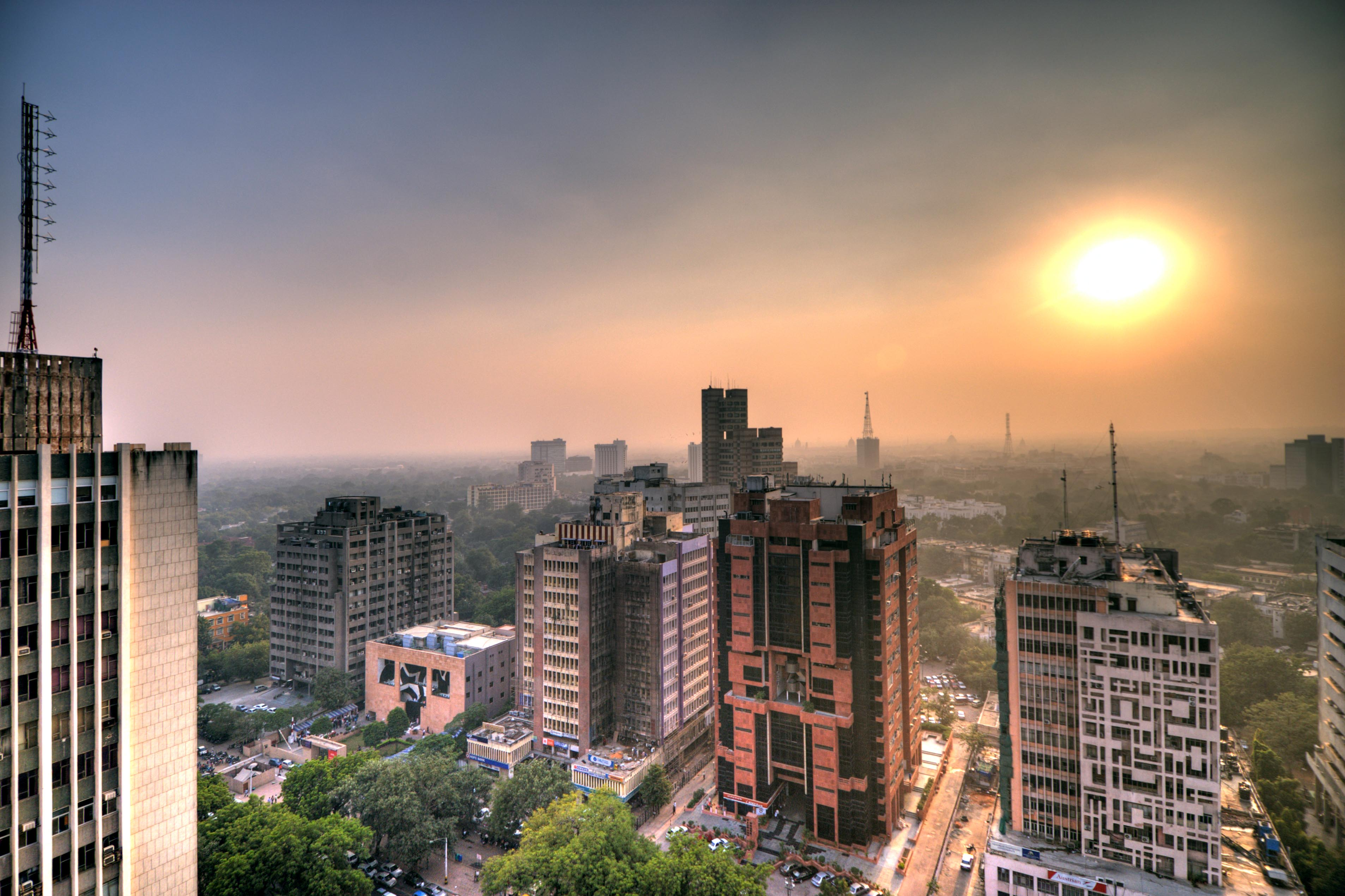 Smog in Dehli, India